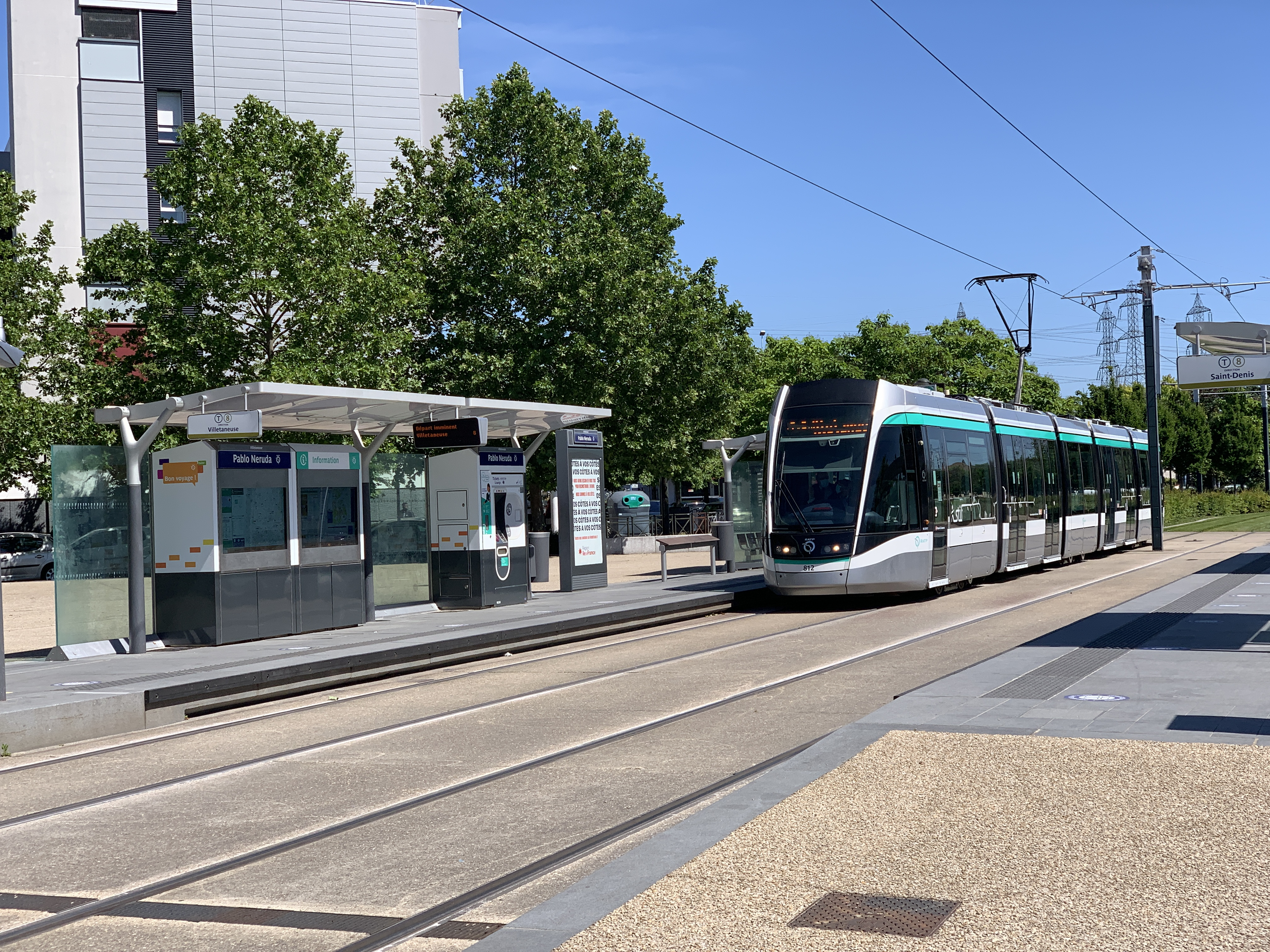 Station de tramway Pablo Neruda, ligne 8 du tramway d'Île-de-France, Villetaneuse.